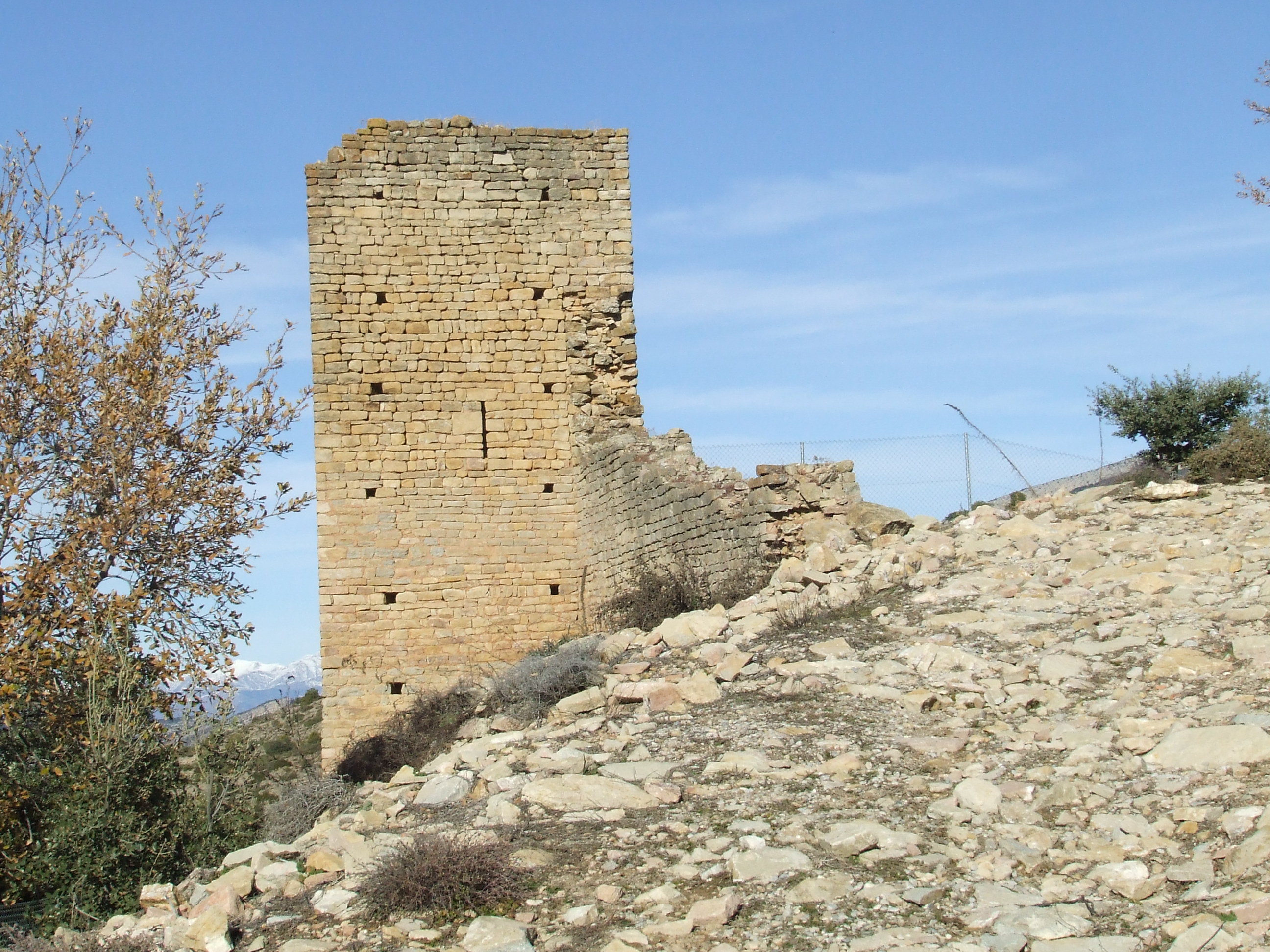 Torre del recinte del castell de Llordà (Llordà, Isona i Conca Dellà, Pallars Jussà)